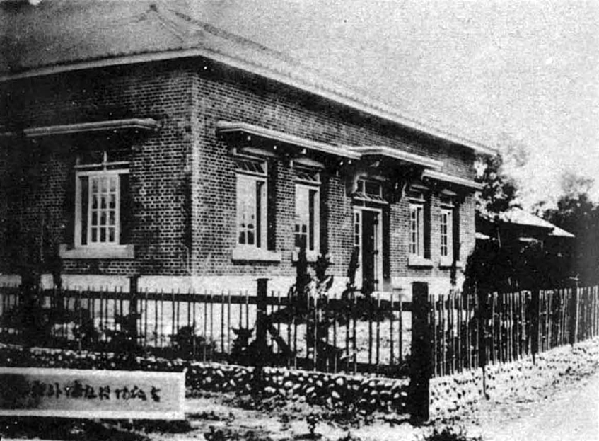 中文（台灣）: 外埔庄役場